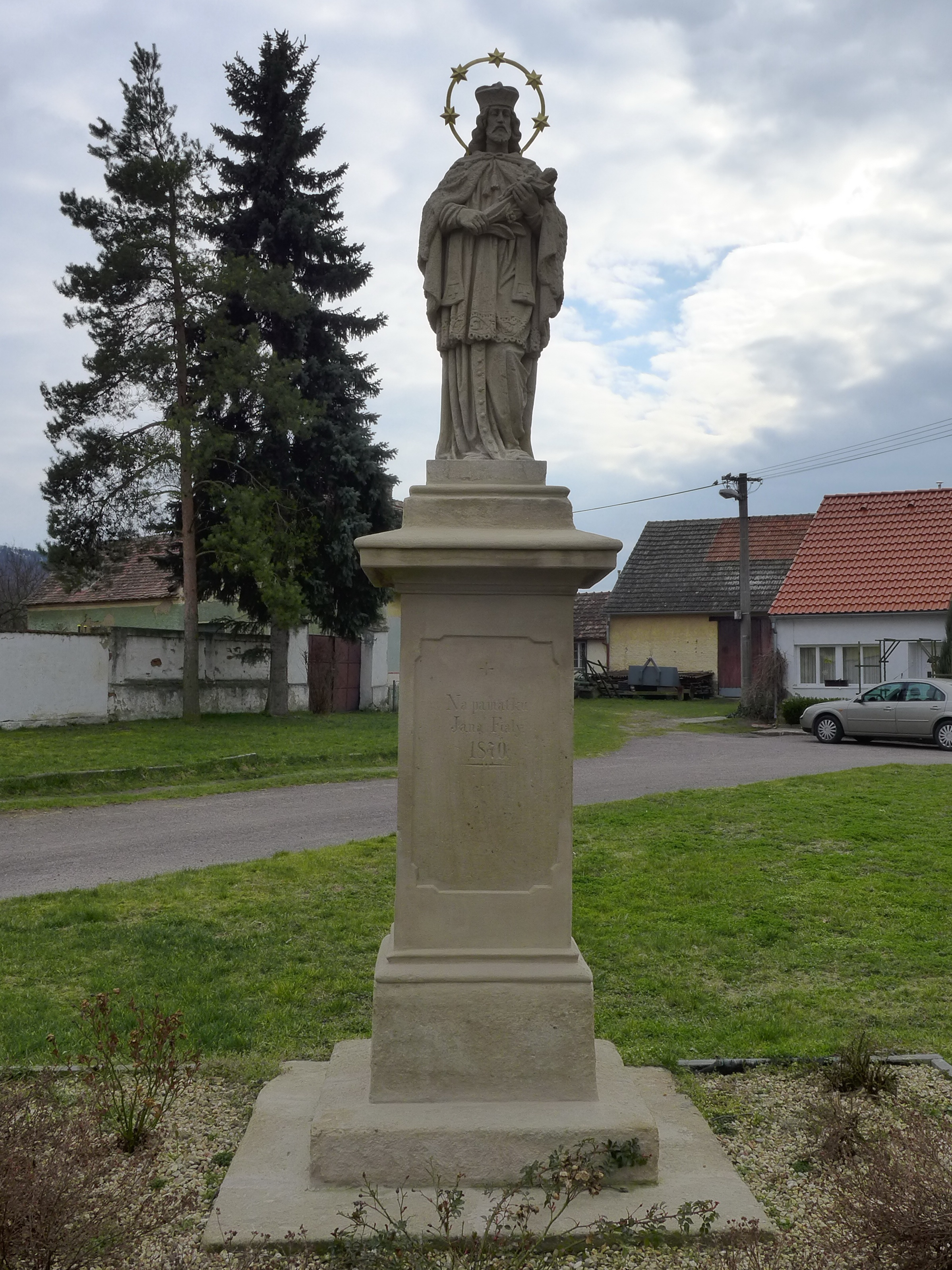 Socha svatého Jana Nepomuckého, náves, Lesonice (okres Znojmo).